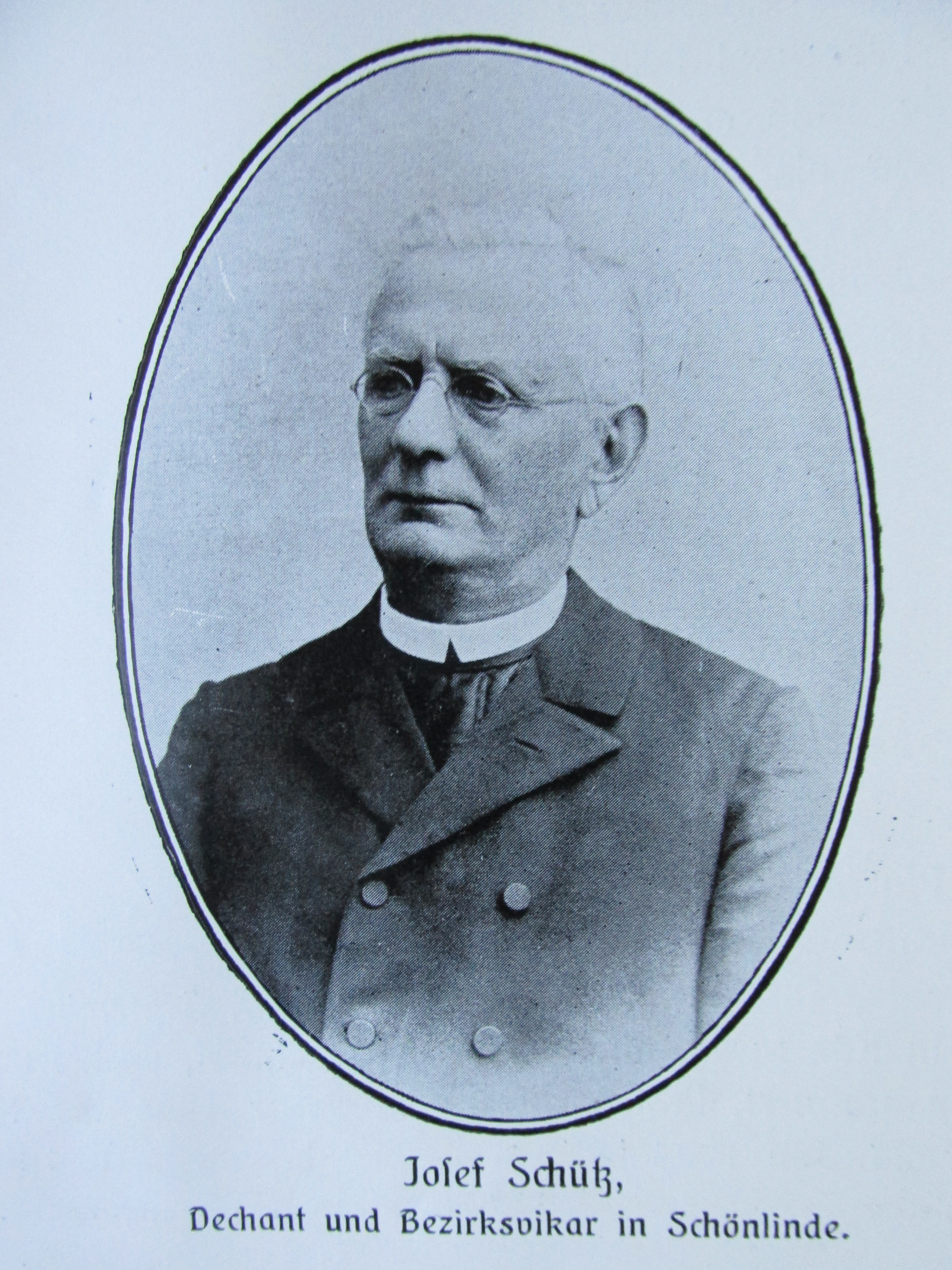 P. Josef Schütz; konzistoriátní rada, okrskový vikář, biskupský notář a děkan; * 05. 04. 1839 v Tuchomyšli u Ústí nad Labem, čp. 11; syn: Wenzl Schütz - domkář a Franziska roz. Fischer; gymnaziální studia v Litoměřicích; filosoficko - teologická studia v Litoměřicích; ord. na kněze 1864; kaplan Kreibitz; kaplan Böhmische Kamnitz (od 1866); farář Kreibitz (od 1882); farář Schönlinde (od 1887)